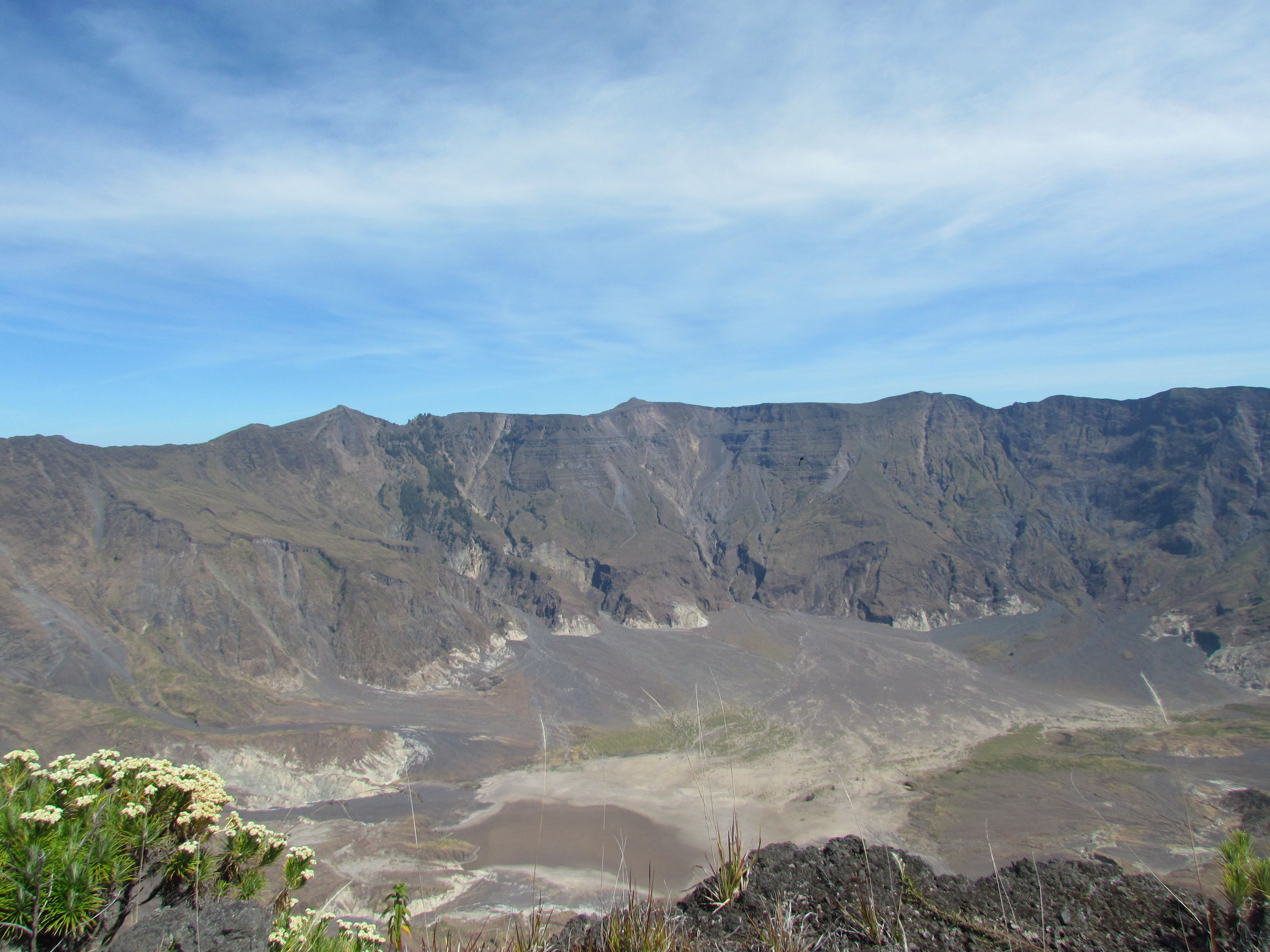 Blick vom Ostrand in westlicher Richtung (GRV 2015)